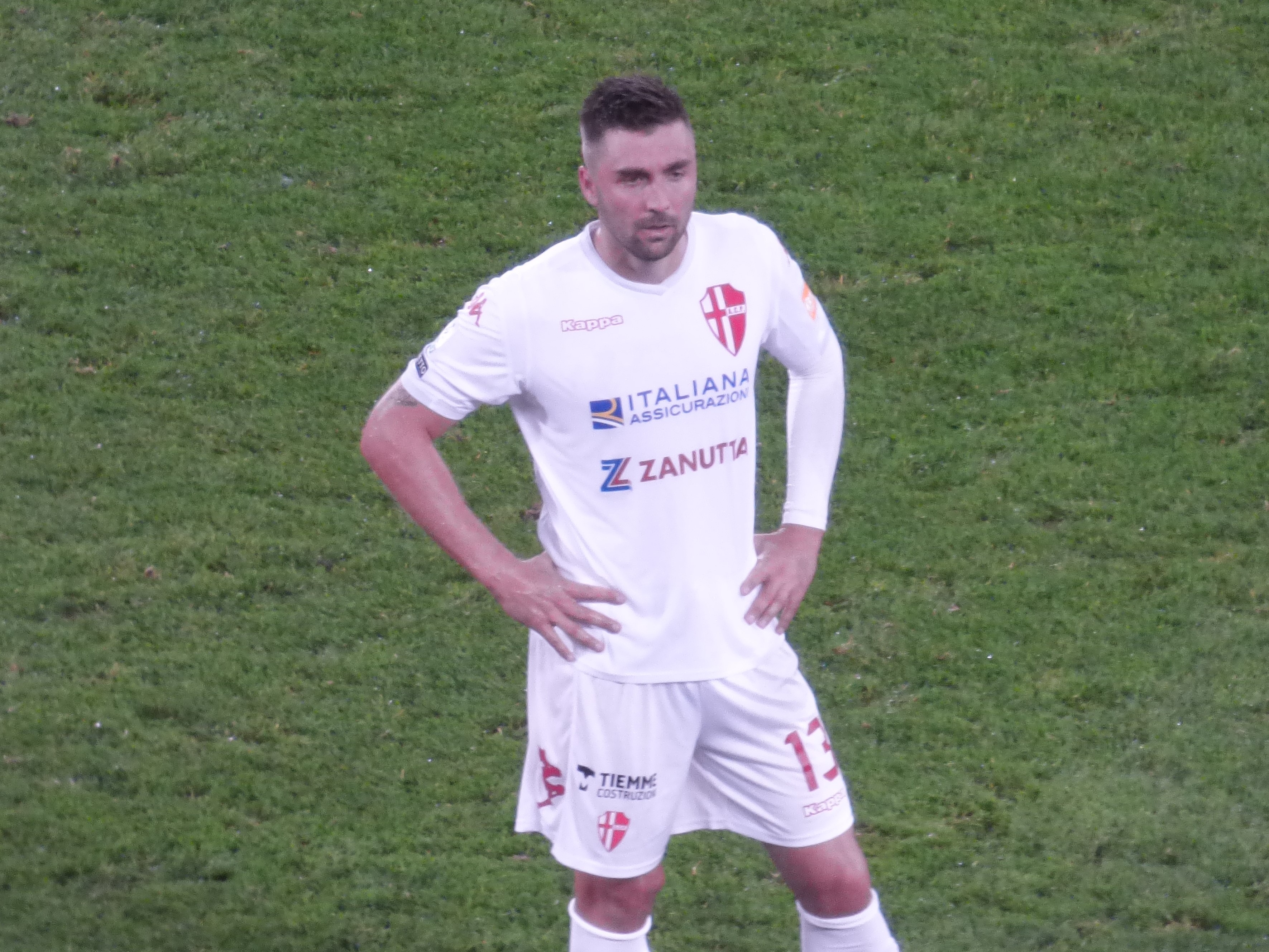 Daniele Capelli lors du match amical RC Lens - Calcio Padova, le 11 octobre 2018 au Stade Bollaert-Delelis de Lens.